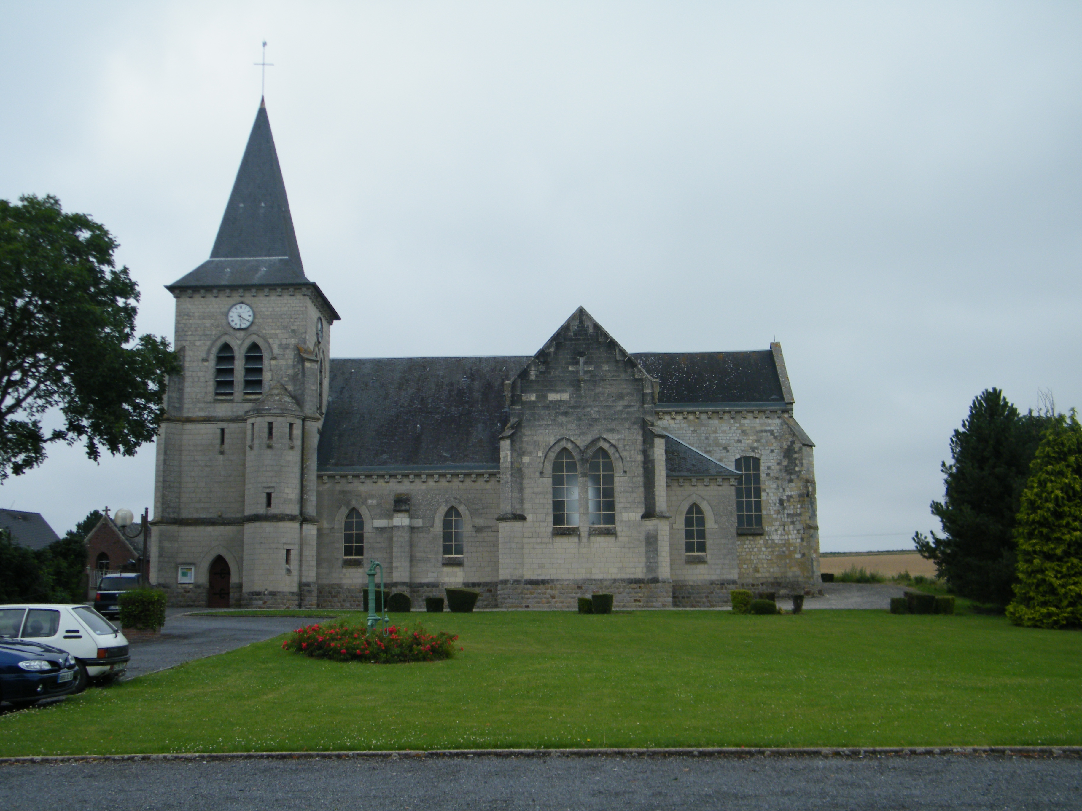 Eglise Saint-Nicolas de Curlu (Somme, France).